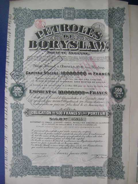 Petroles de Boryslaw - obligacja naftowa, 5 % obligacja na 500 franków, na okaziciela, serii B, rok 1920 Kapital spolki 10 mln. frankow.